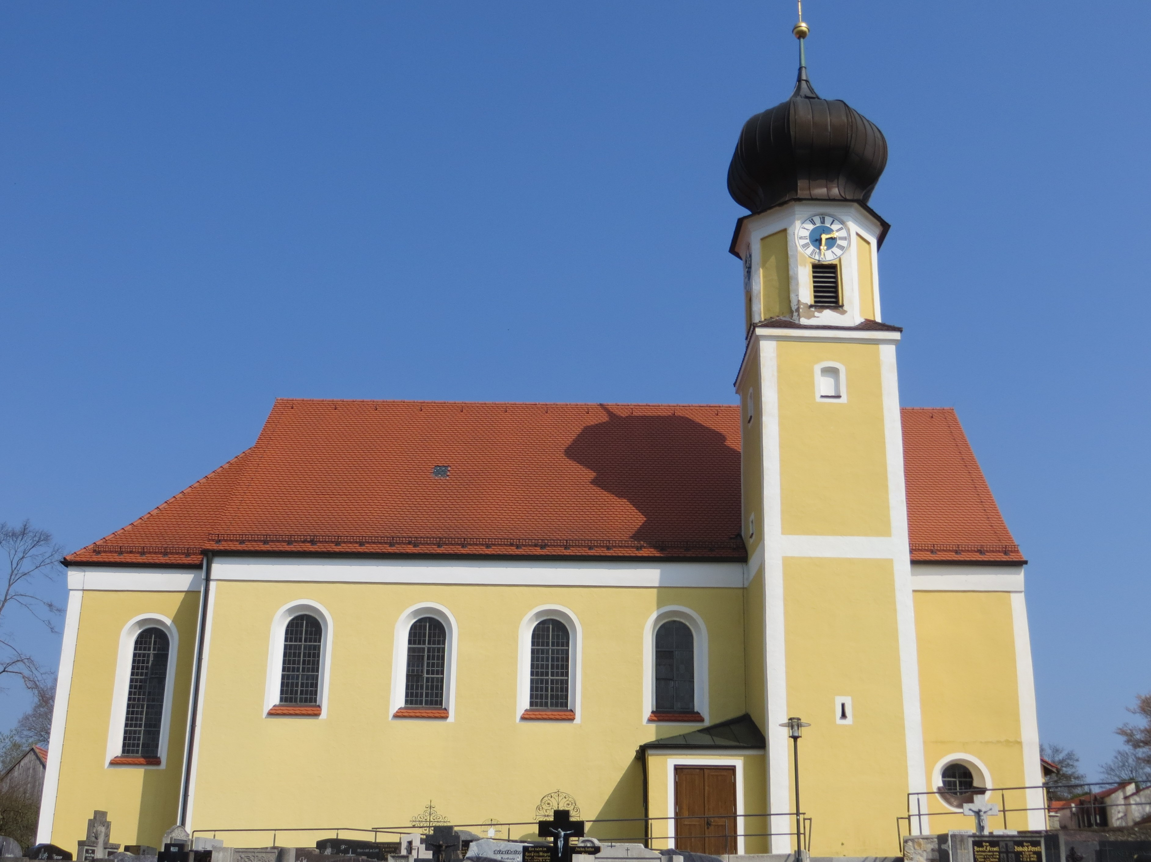 St. Maria - Frauenberg